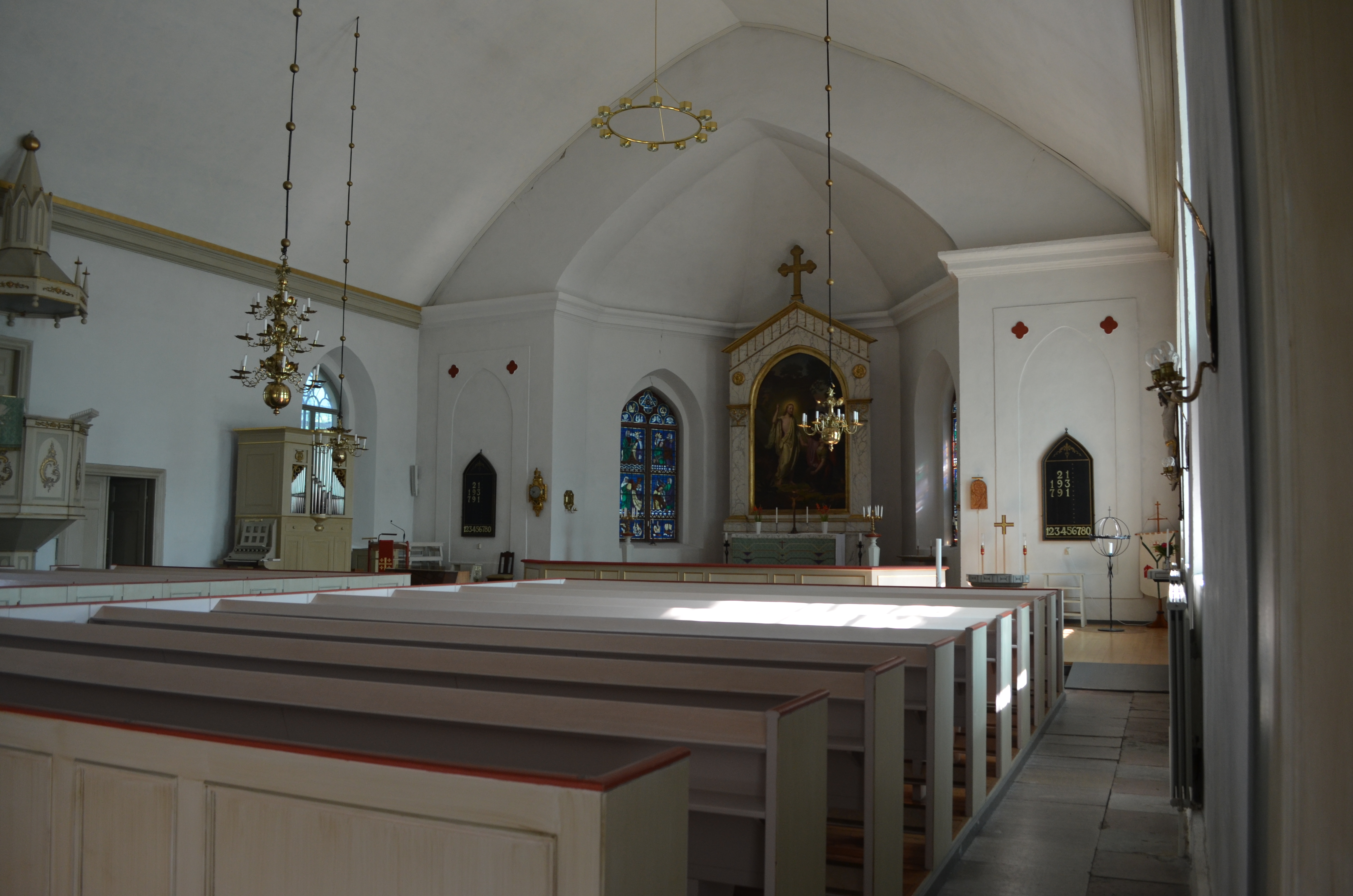 Förlösa kyrkas kyrkosal